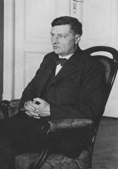 Aleksander Jabłoński polski fizyk (1935)